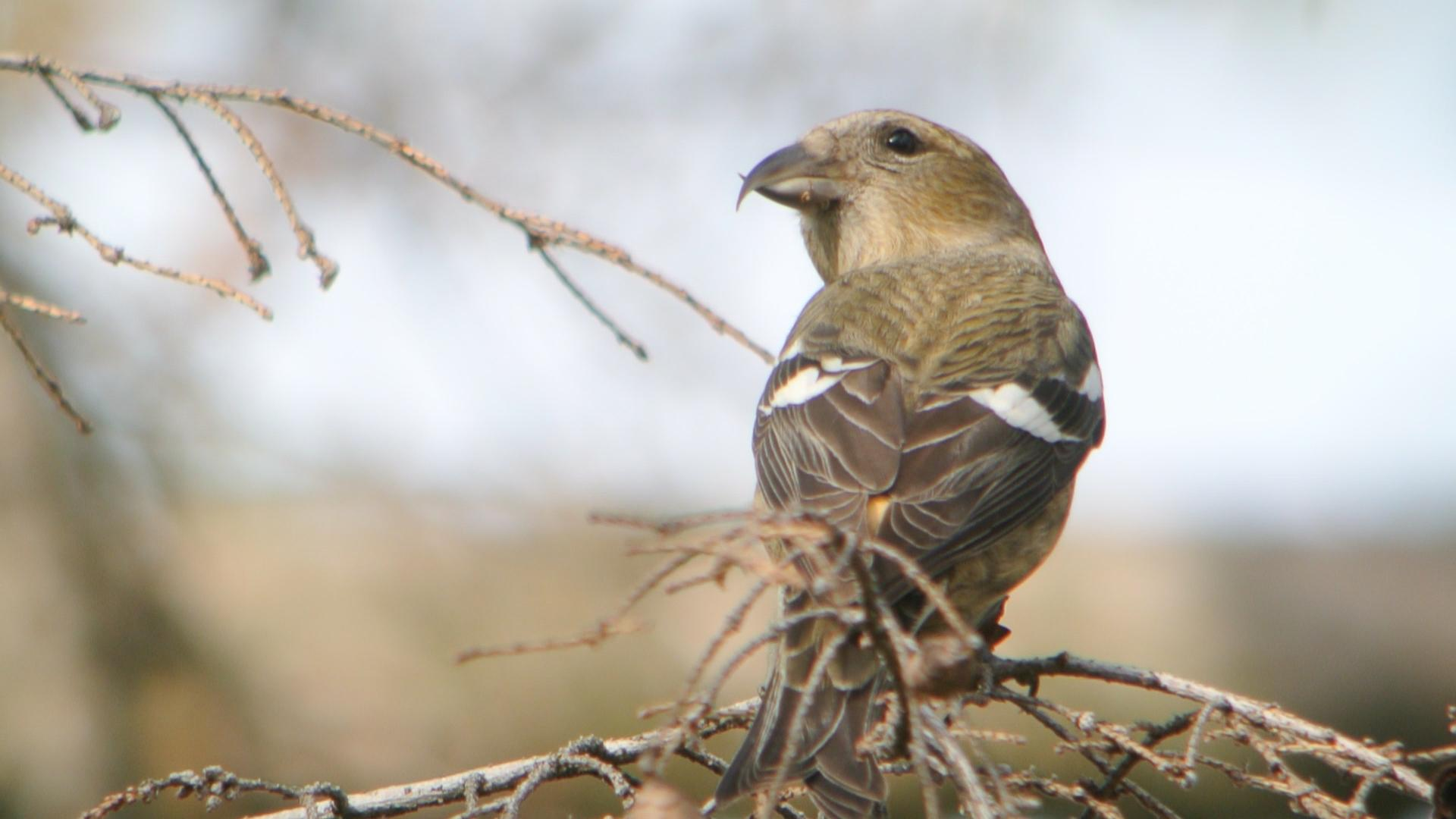 Carondelet Park in St. Louis MO on 12/2/12